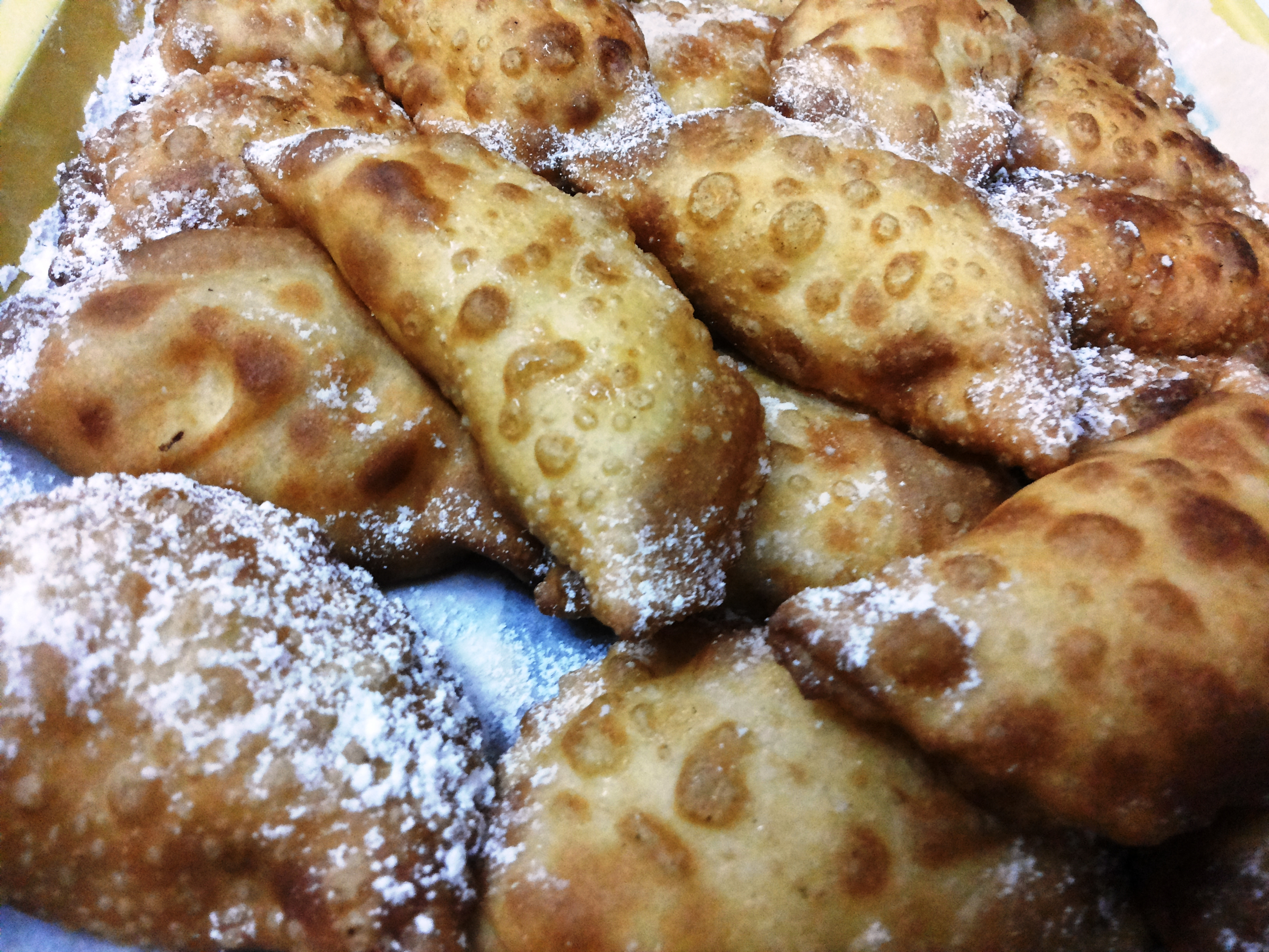 Cassatelle - Dolci ripieni con ricotta, specialità della cucina alcamese e trapanese in generale.